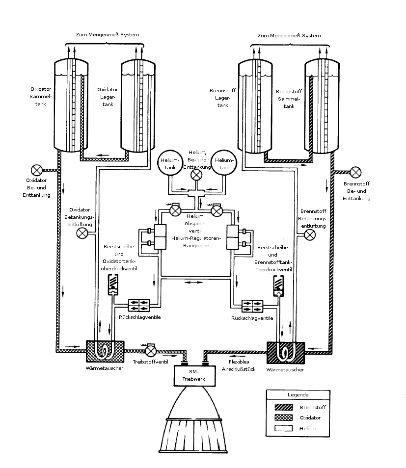 Schematische Darstellung des Antriebs des Apollo Service Moduls.